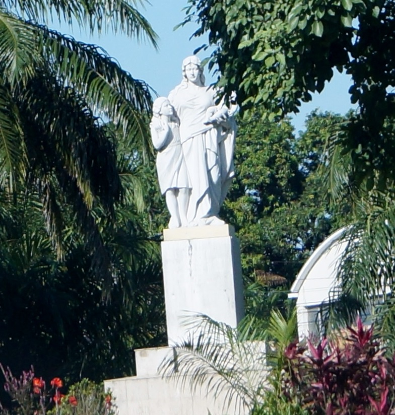 Monumento a la Madre en San Pedro Sula